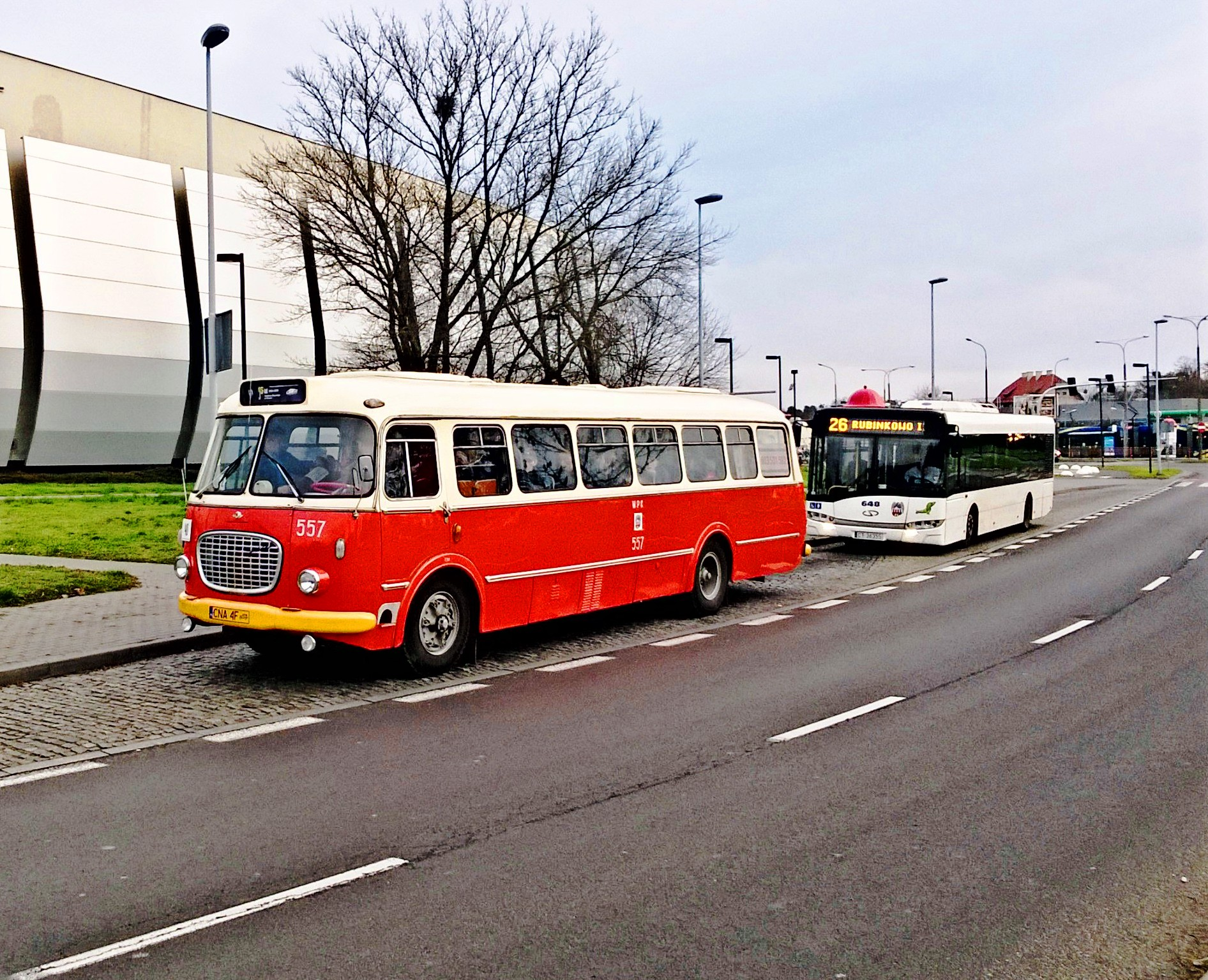 Autobus marki Jelcz w Toruniu, 2019